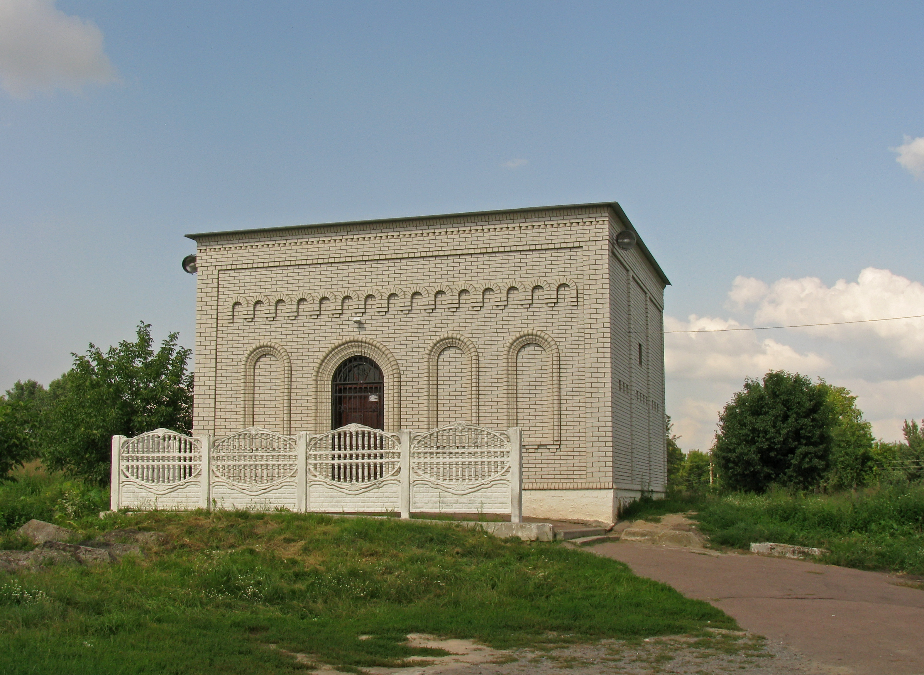 Пантеон на могилі цадика Леві Іцхака Бердичівського, Бердичів, єврейське кладовище